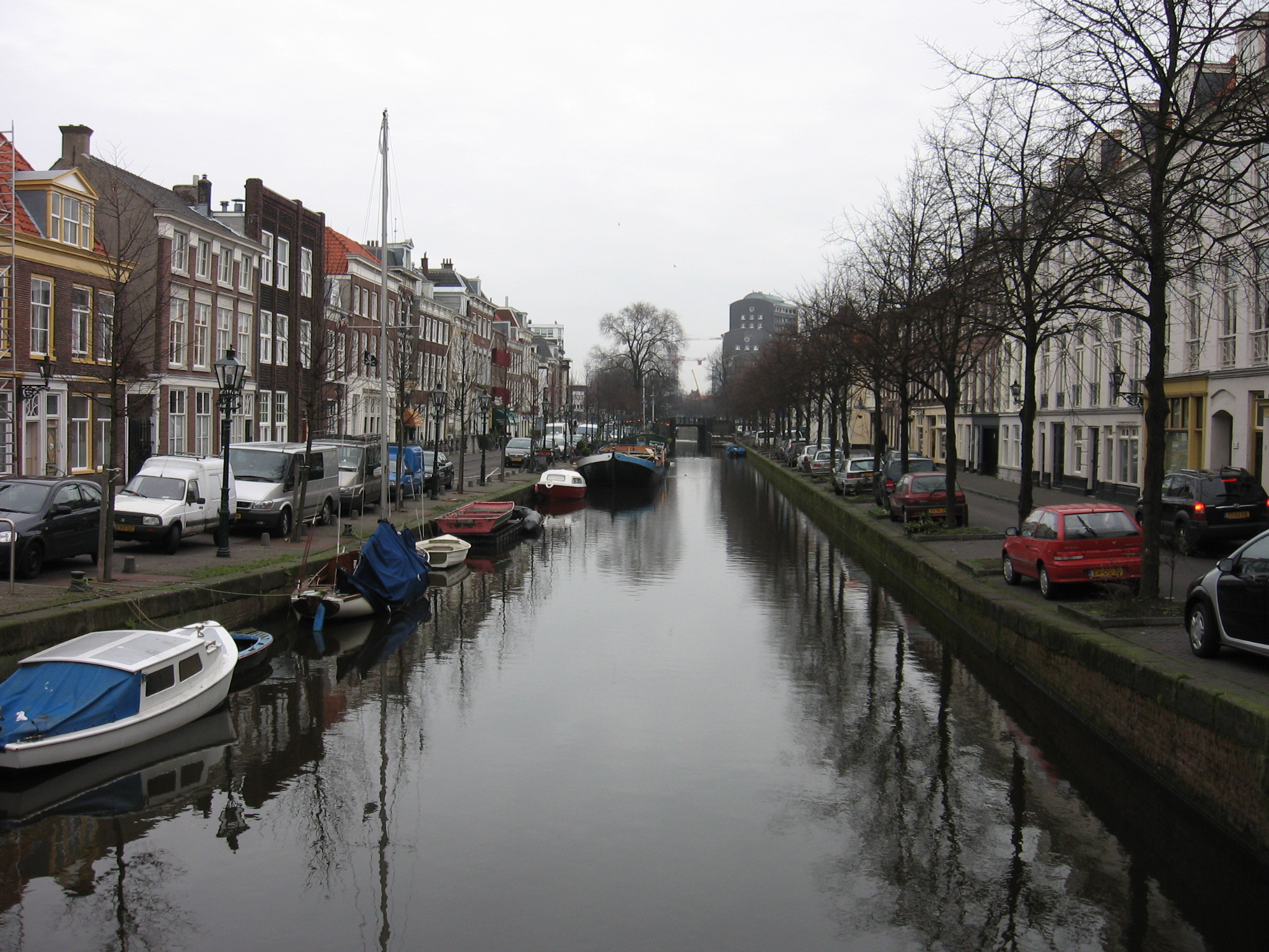 Den Haag